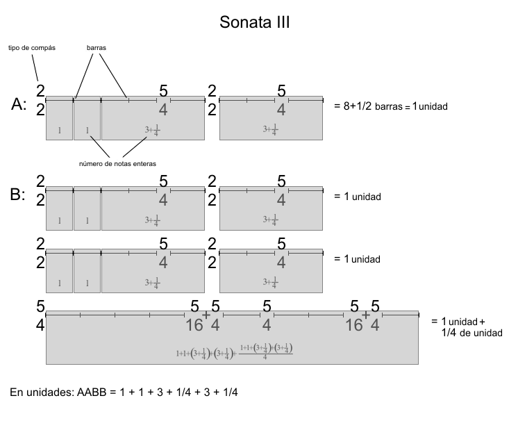 Gráfico explicando las proporciones estructurales en la Sonata III de Sonatas e interludios de John Cage.